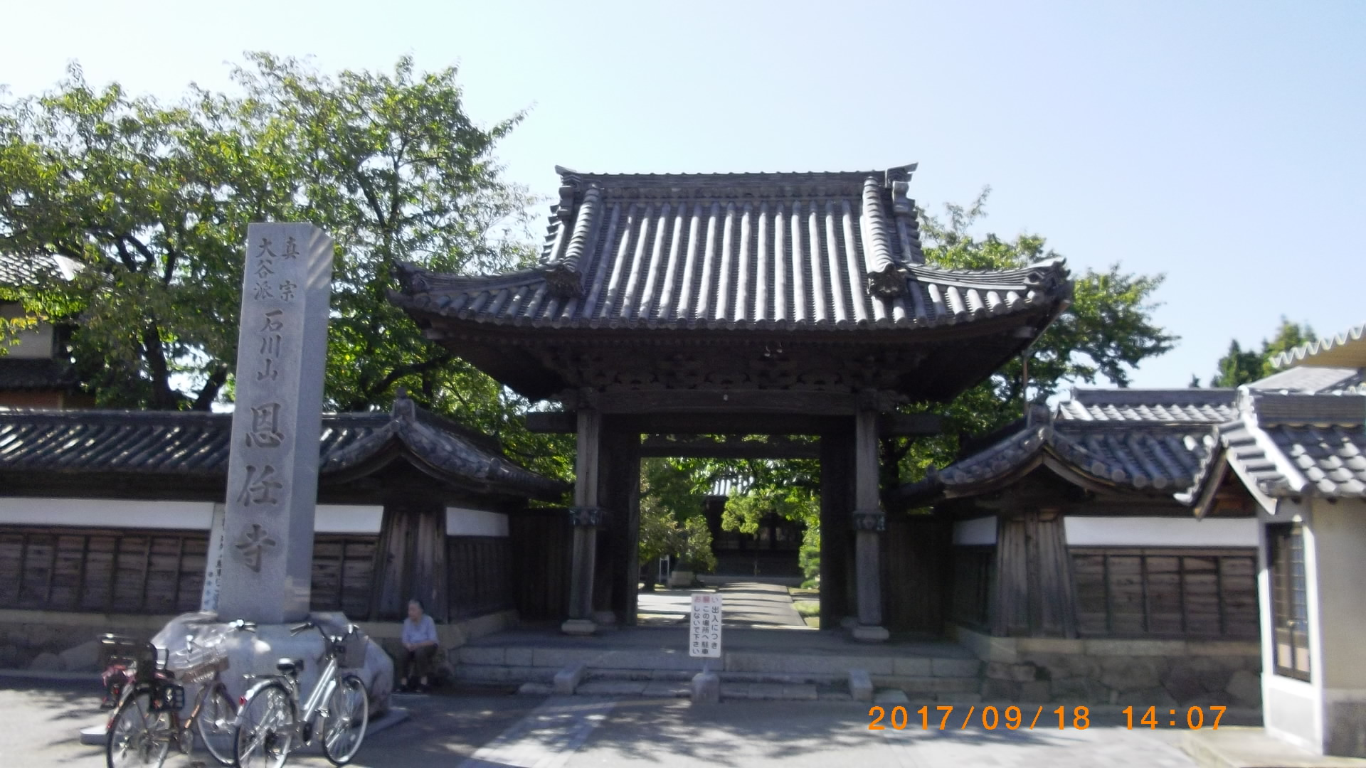 三州瓦を使った建築物